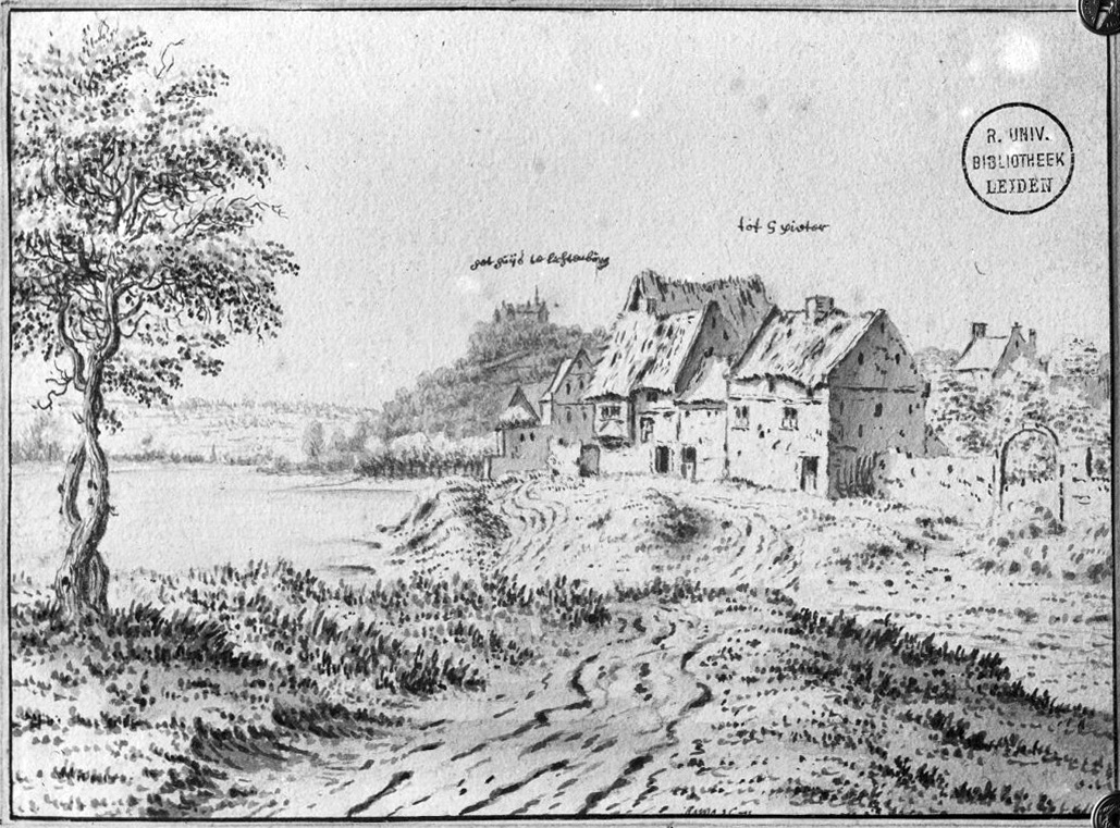 gezicht op Sint Pieter en Ligtenberg naar oude tekening